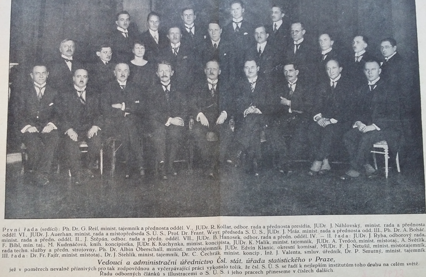 Členové Státního úřadu statistického z ročenky této instituce. Většina zobrazených byla však zároveň členy SPSNO.